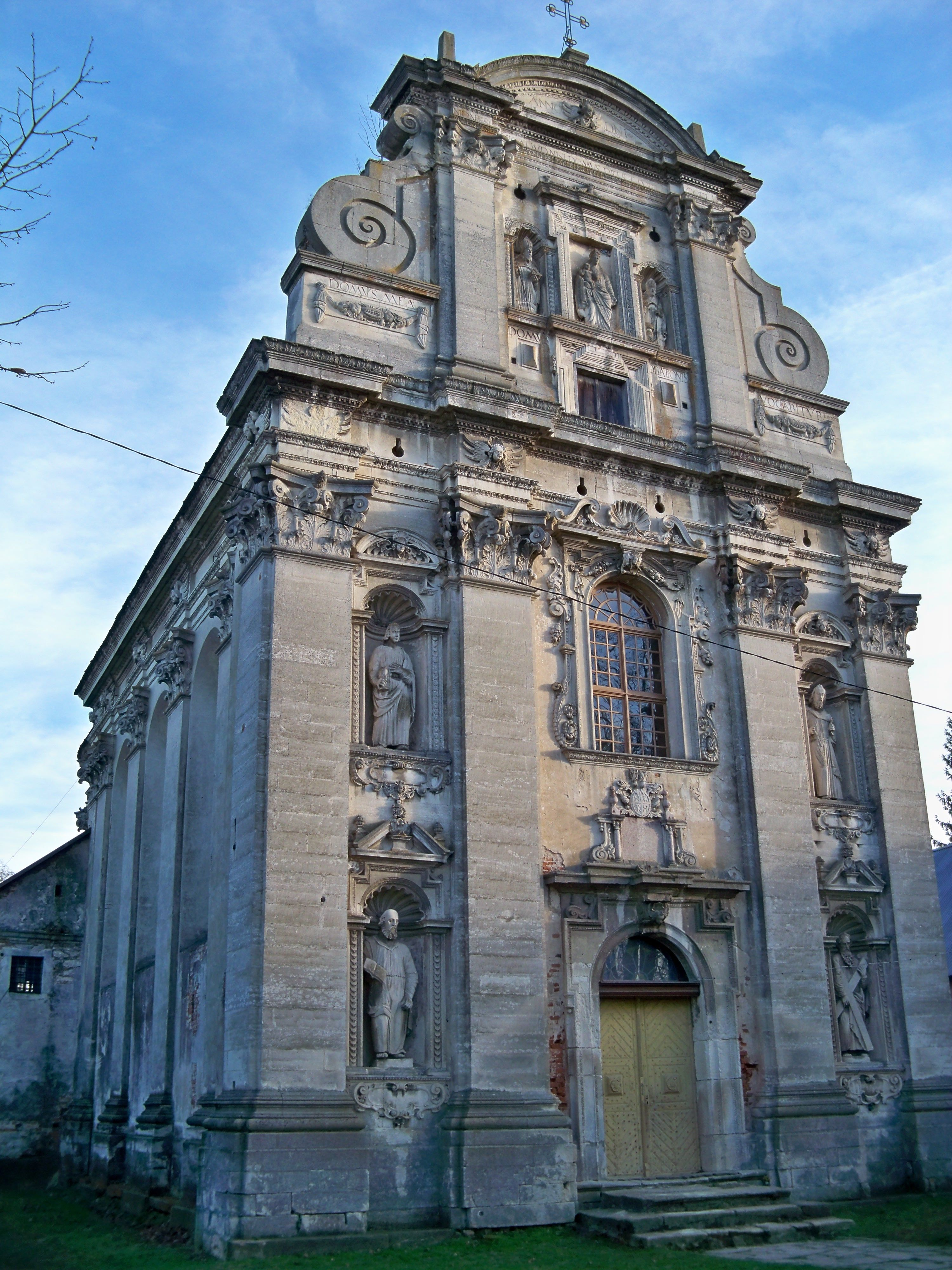 Костел Різдва Богородиці (мур.), Комарно, вул. Попова